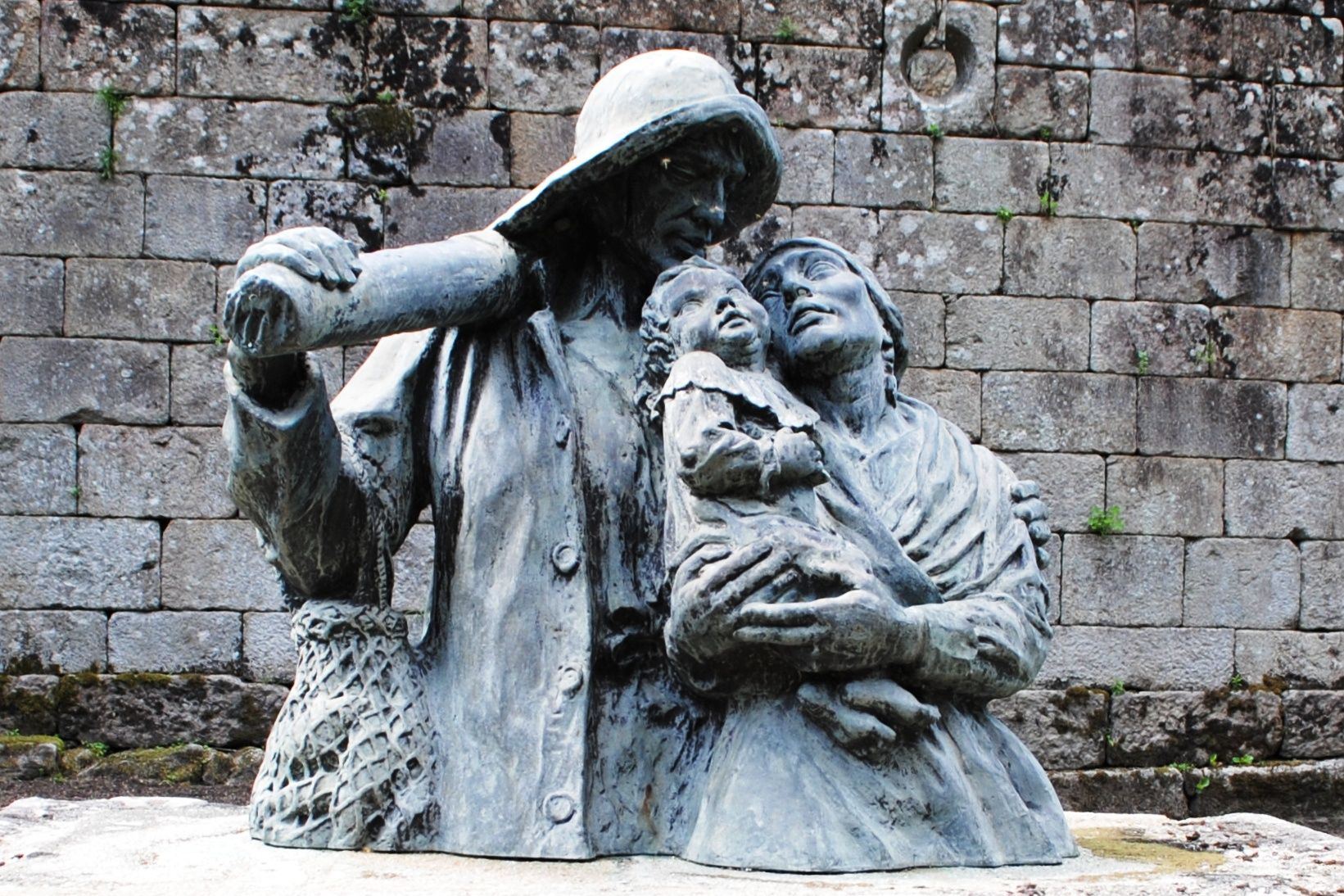 Mariñeiros del escultor José María Acuña López, en los jardines del Castillo de Soutomaior.